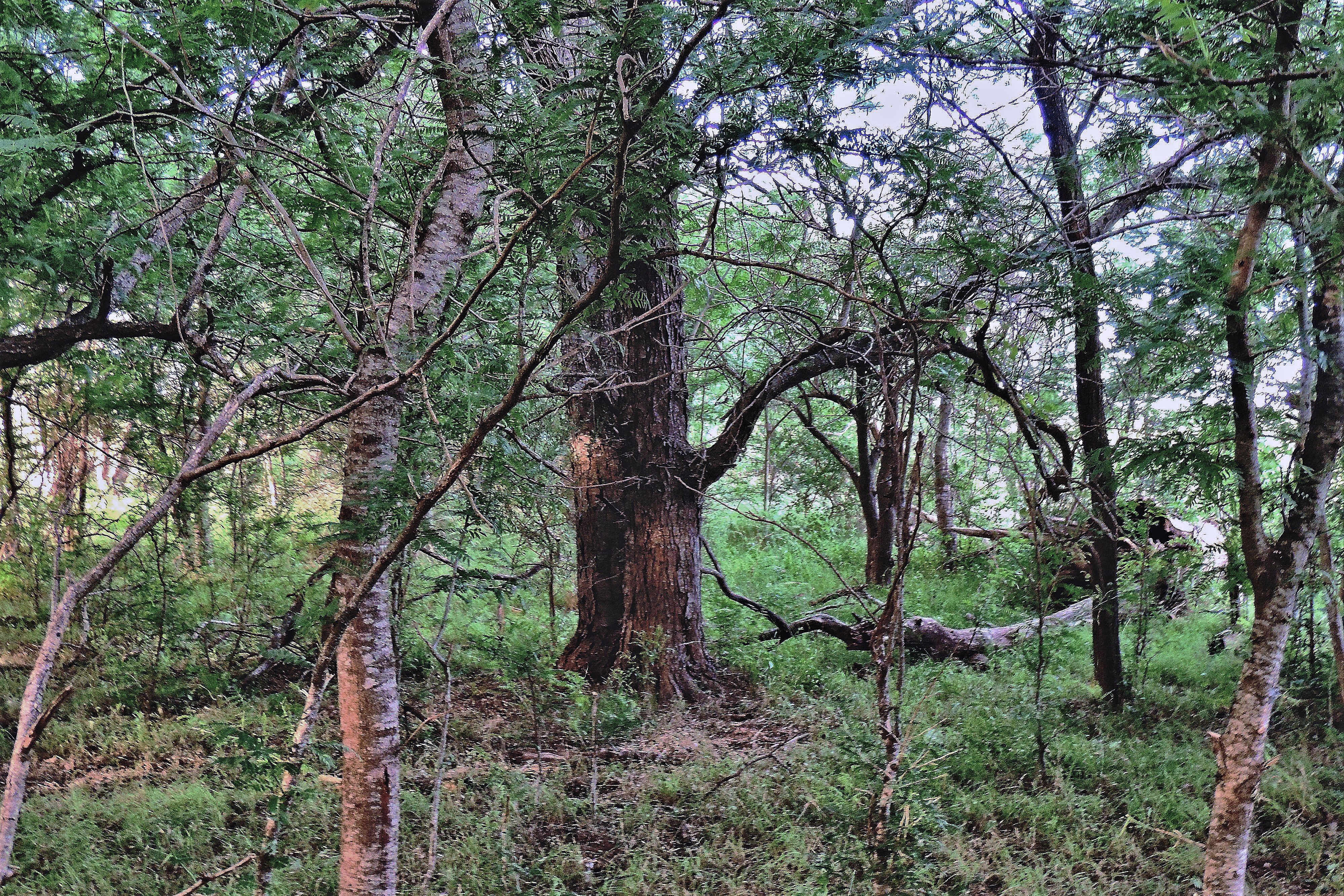 Testimonio gráfico de los caminos que nunca se cultivaron